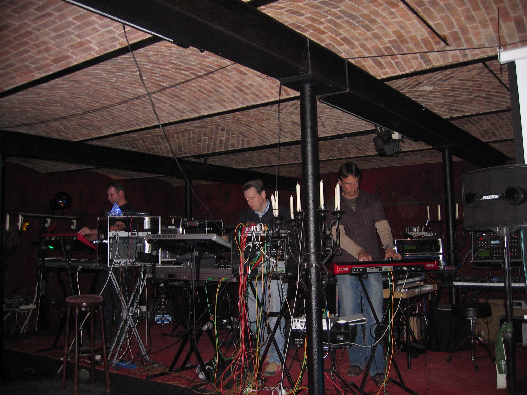 Pyramid Peak, Satzvey Festival, April 2007